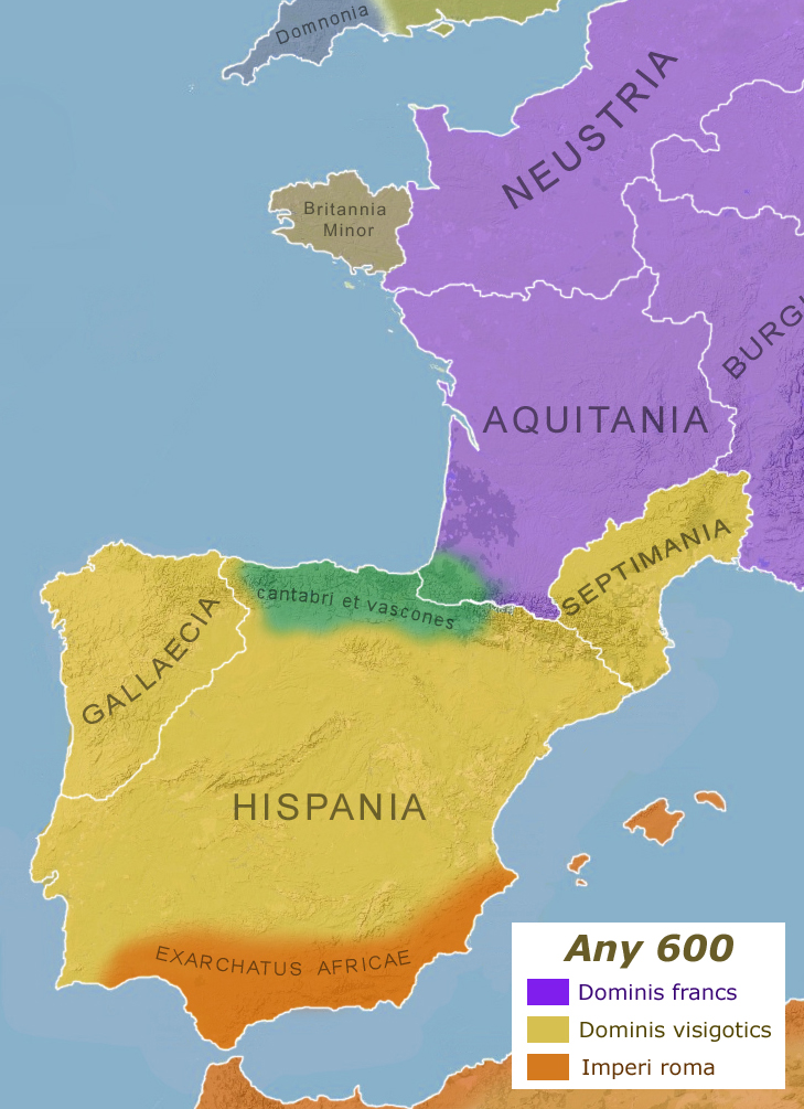 Europa occidental l'any 600